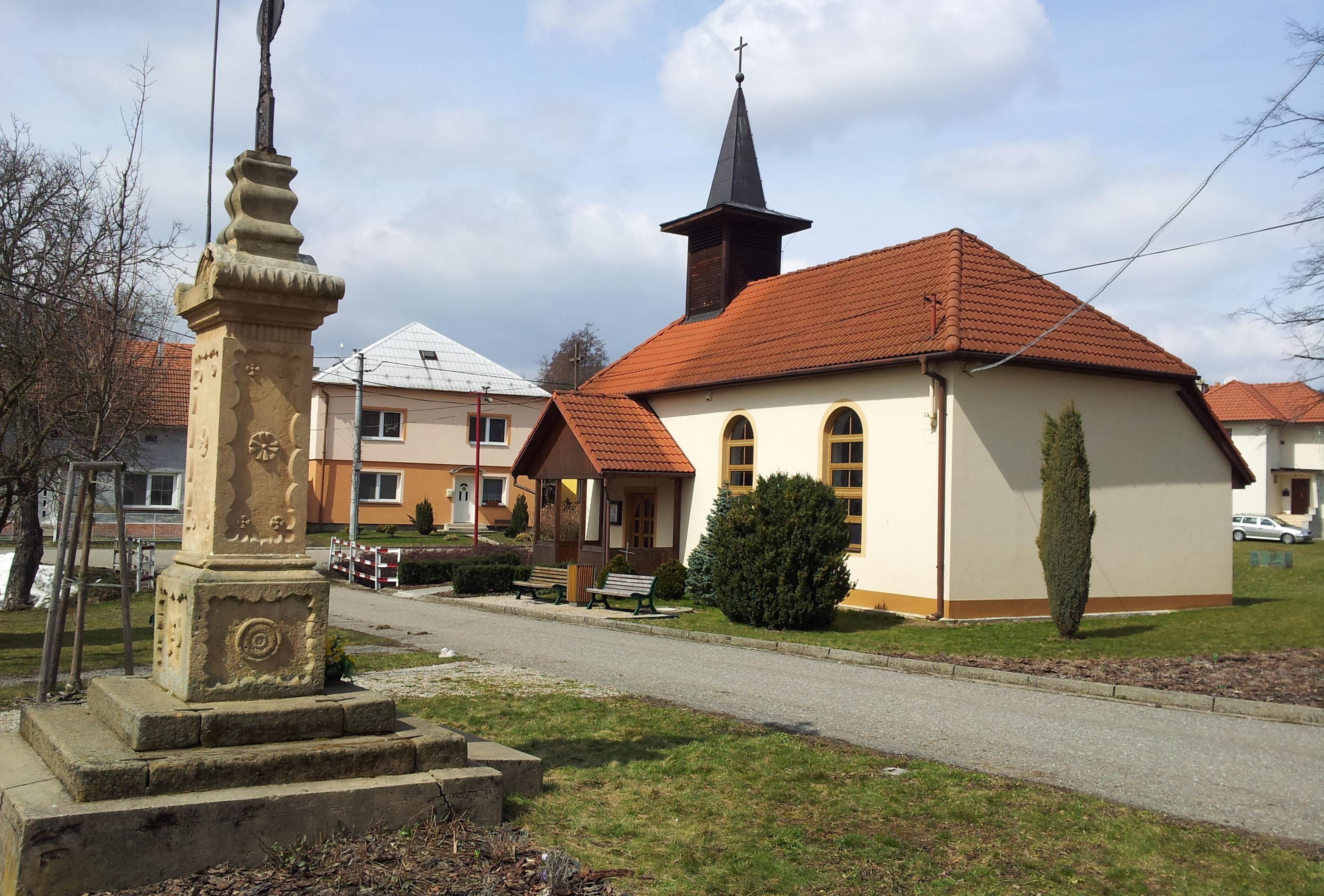 Dobrkovice